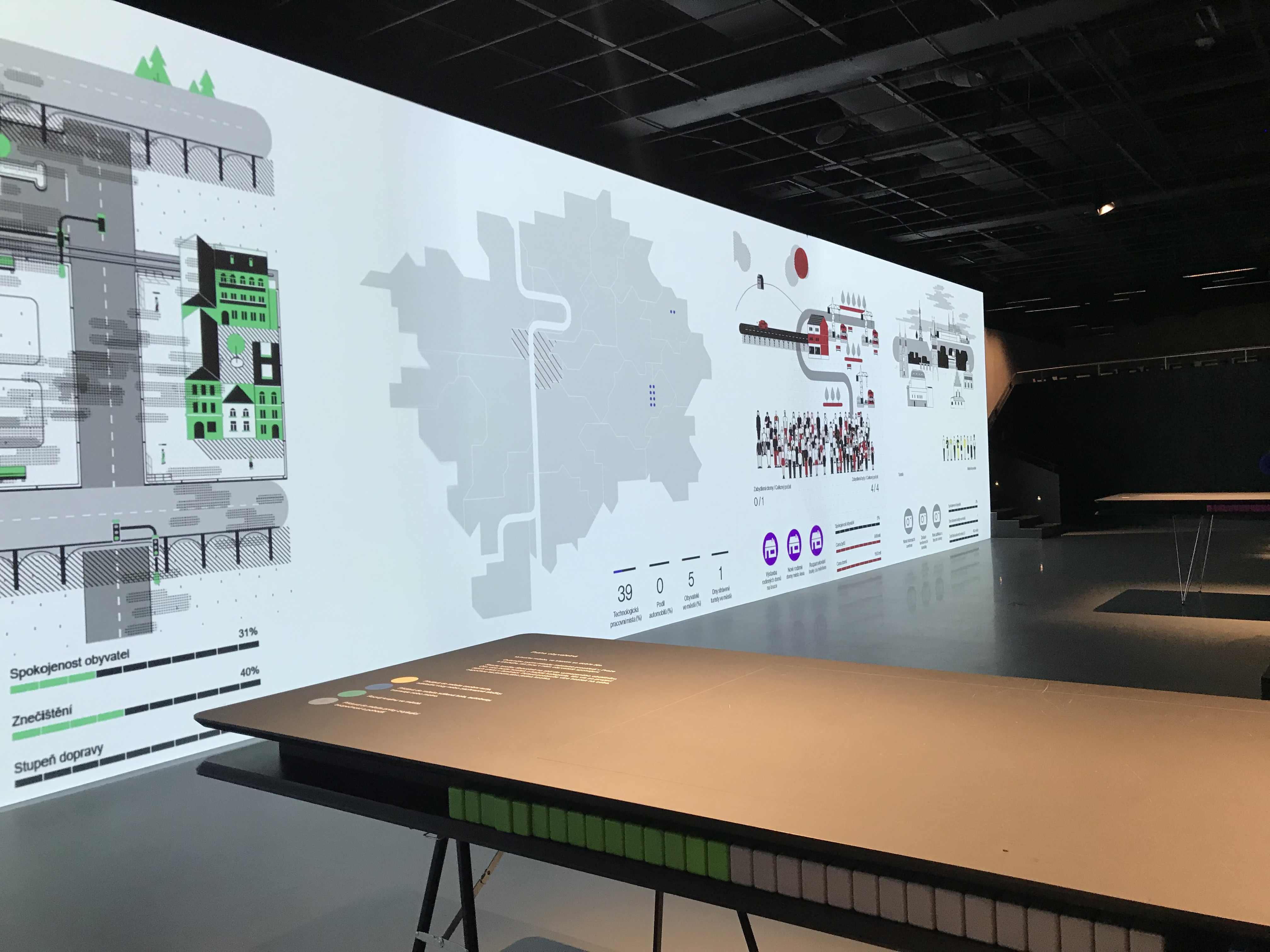 Výstava Pře(d)stav si Prahu! (Představ si Prahu!) v CAMPu v Praze